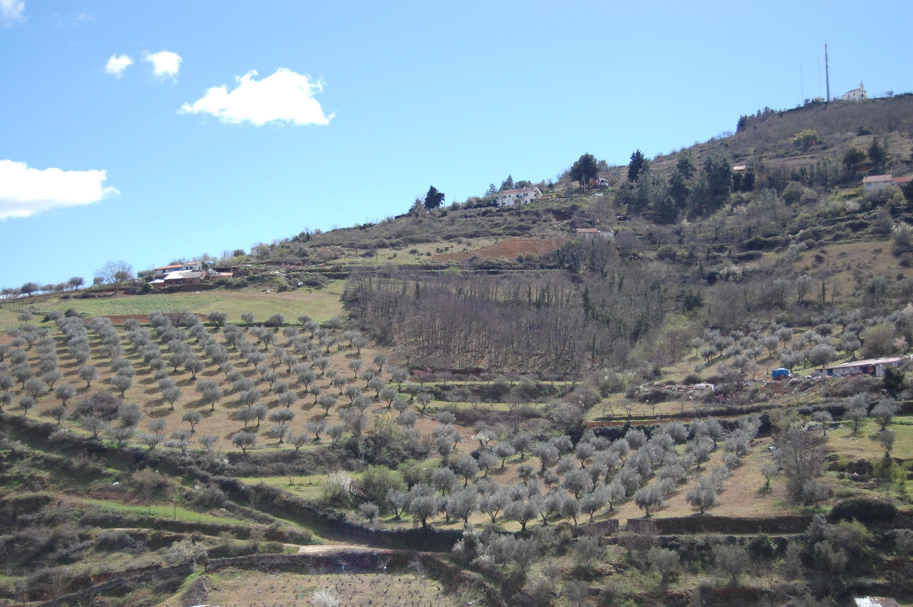 Oliveiras na cidade de Bragança, nordeste de Portugal.